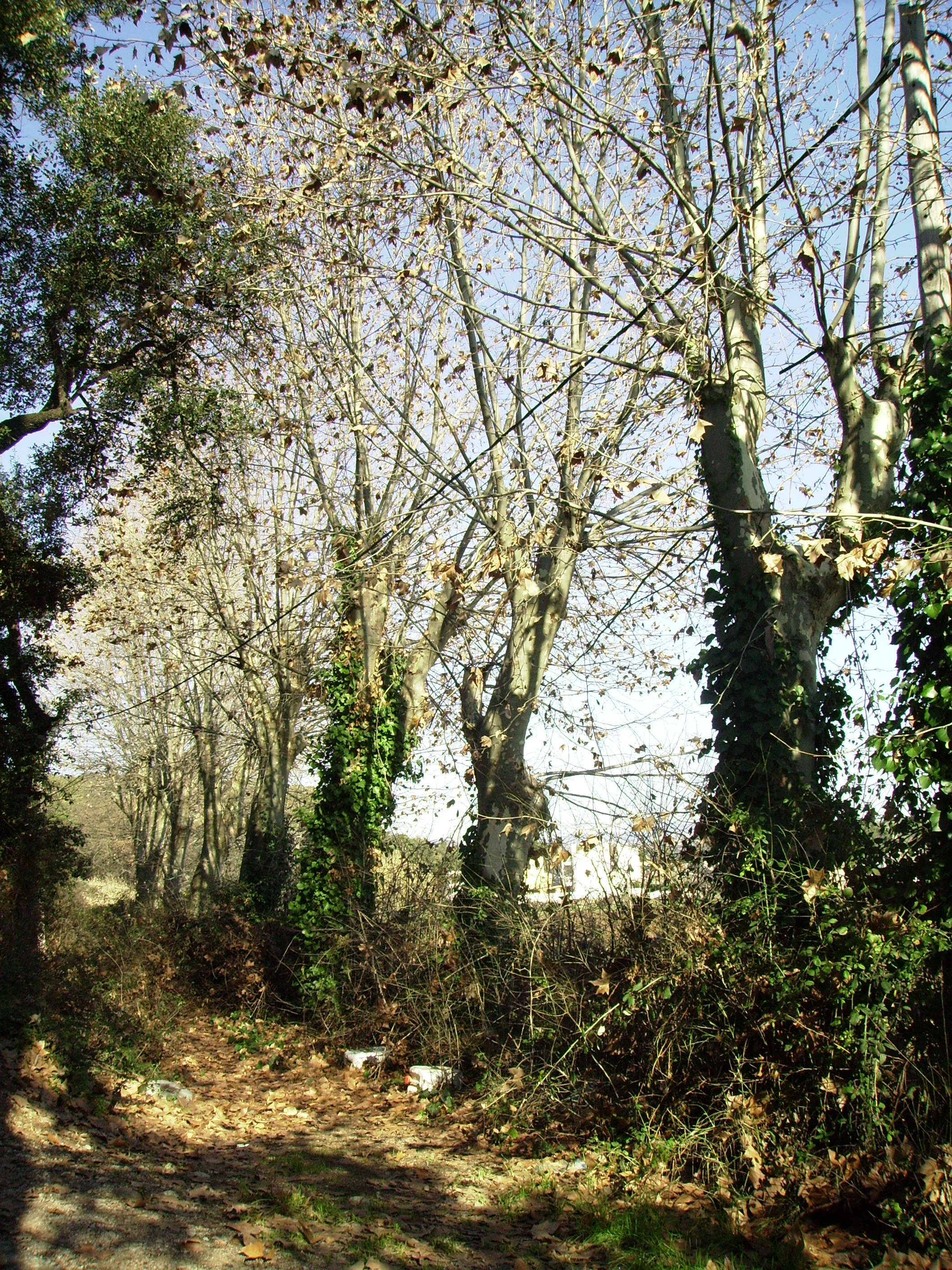 Els plataners de la Font de Sant Roc a l'hivern de Palau-soità i Plegmans